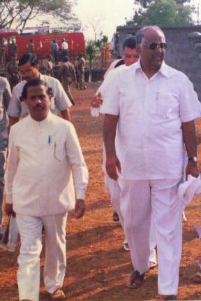 राजाराम मुकणे शरद पवार यांच्या समवेत